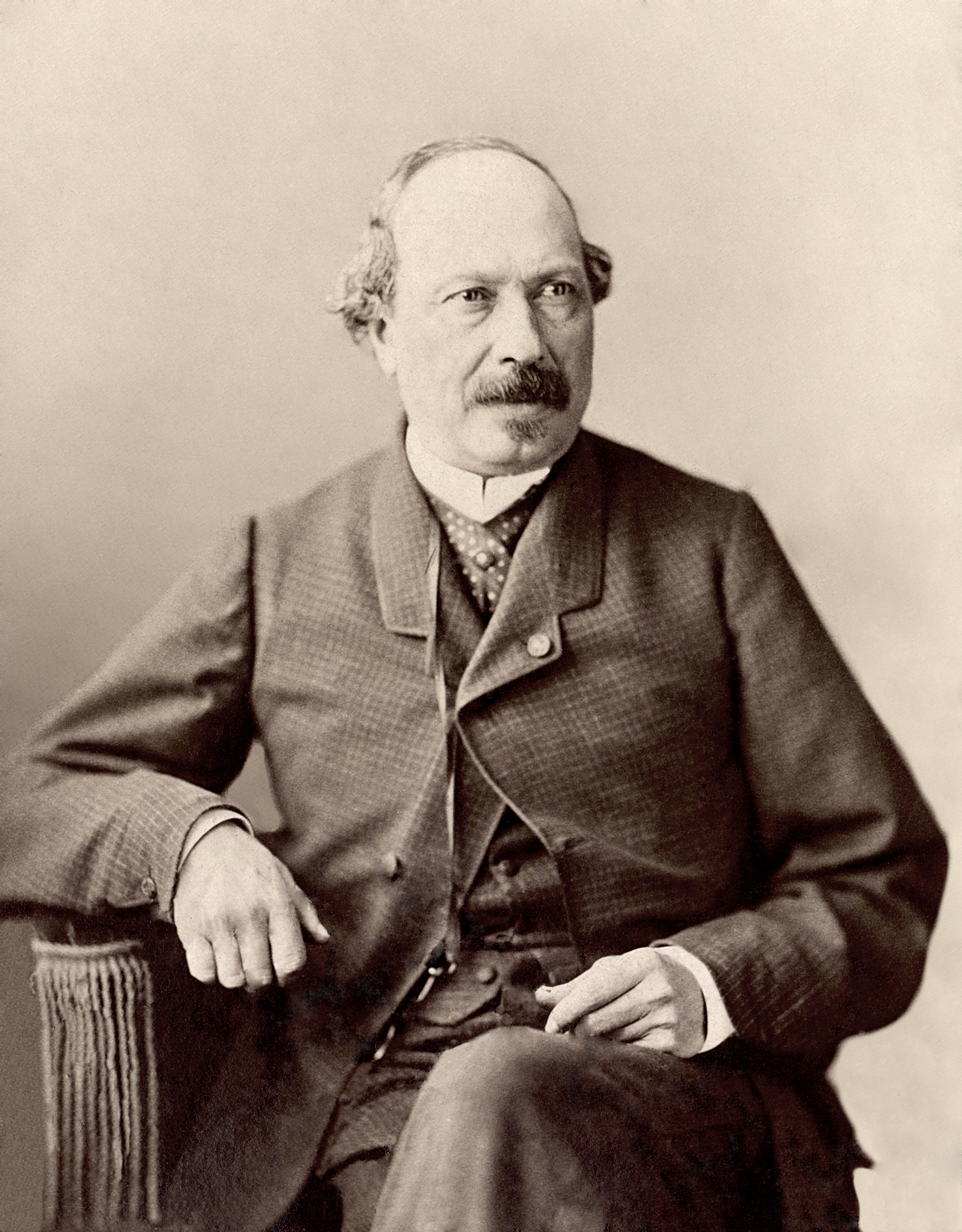 François Ponsard (1814 - 1867), Dramaturge français.